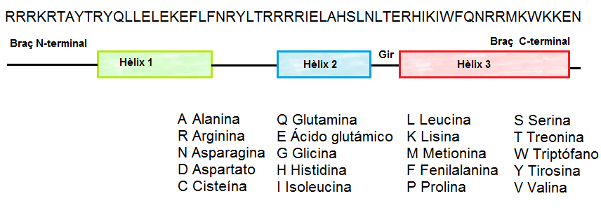 Seqüencia consensuada (estructura primària) del homeodomini i repartició dels aminoàcids segons els motius (estructura secundaria) trobats en aquest.